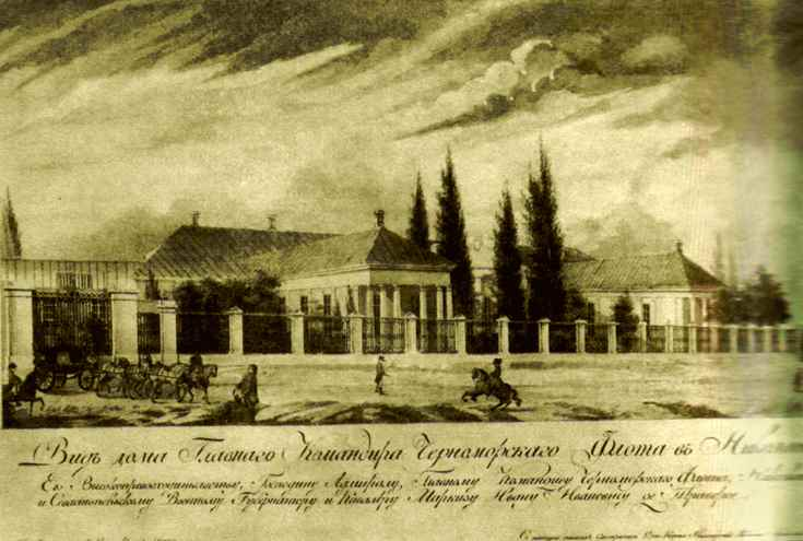 Николаев